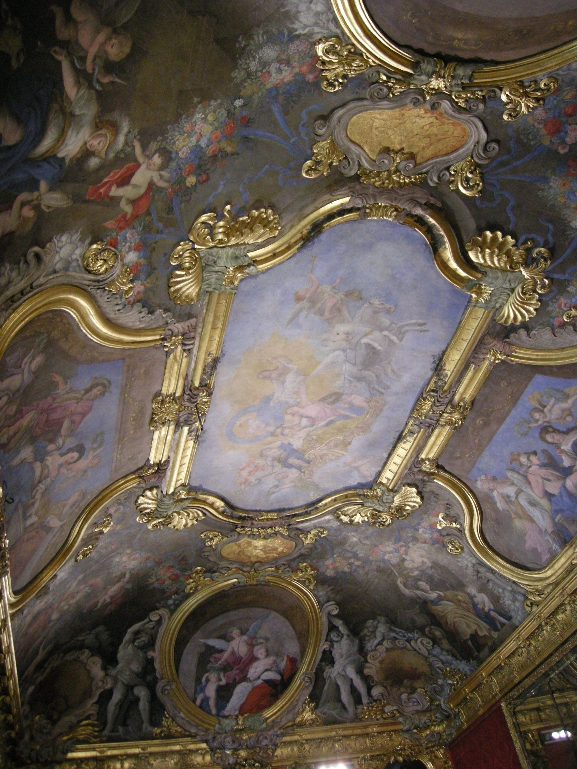 Palazzo madama torino, piano nobile